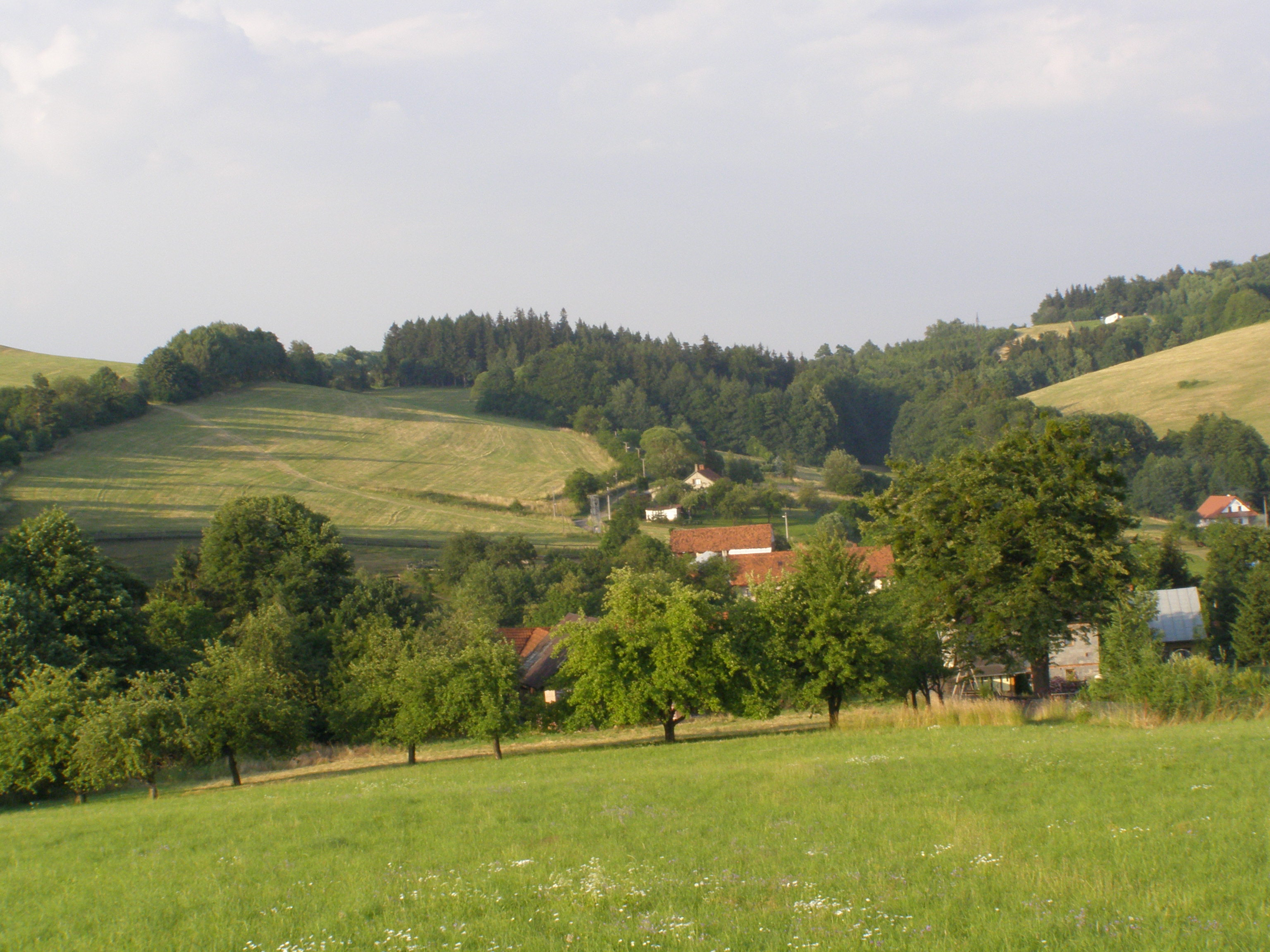 Štramberská vrchovina: Metylovická pahorkatina, vlevo vzadu lokalita Lišky